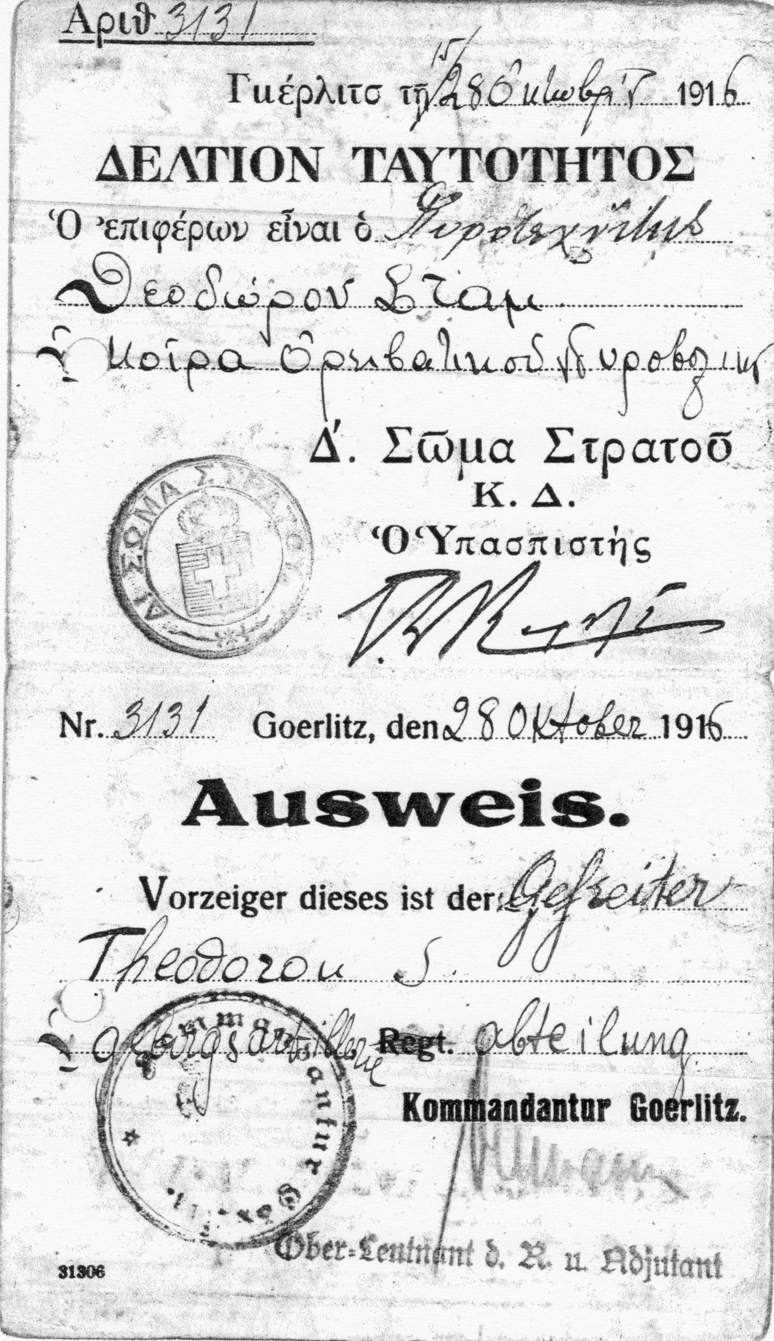 Ausweis des griechischen Soldaten Theodozou S. für das Internierungslager in Görlitz während des Ersten Weltkrieges 1916